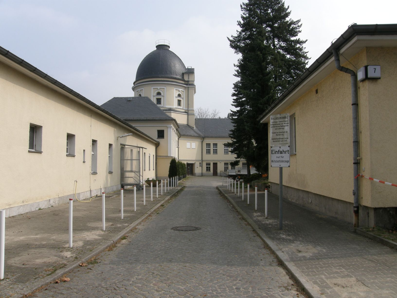 Wirtschaftshof des Krematoriums Wilmersdorf auf dem Friedhof Wilmersdorf in Berlin